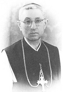 Matthäus Quatember (1894 - 1950), Generální opat cisterciáckého řádu.